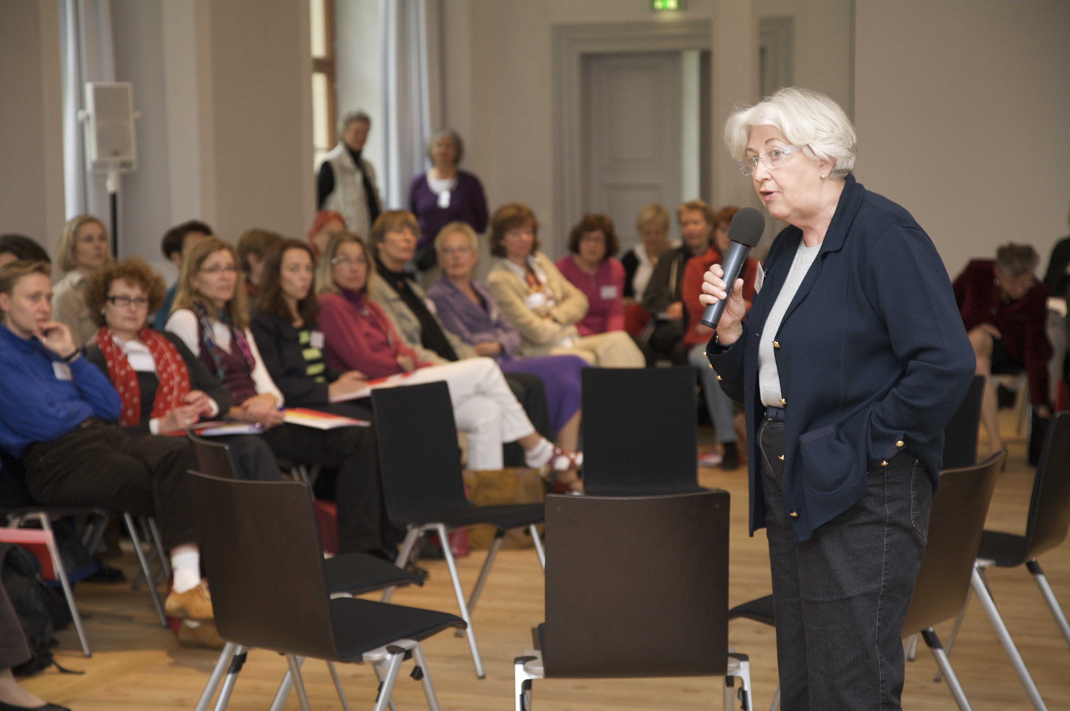 Diskussionsrunde